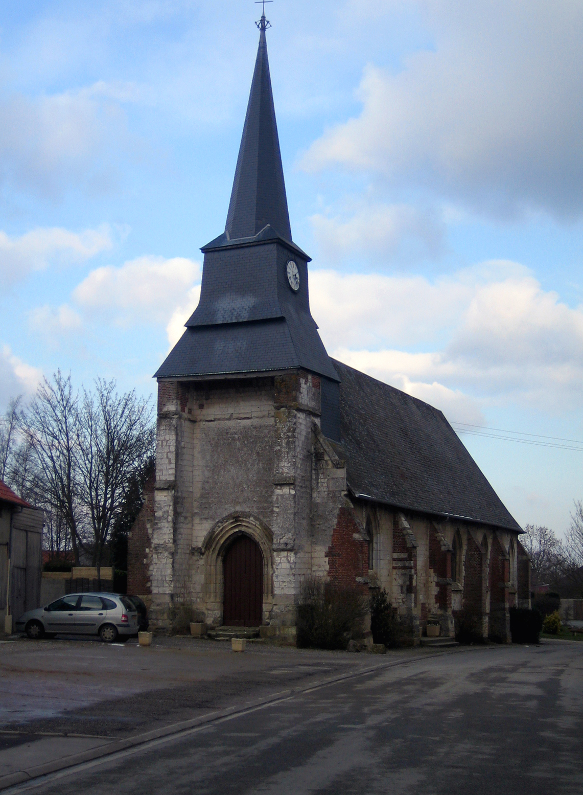 Grattepanche (Somme, France) - L'église Saint-Cyr et Sainte-Julitte. . .